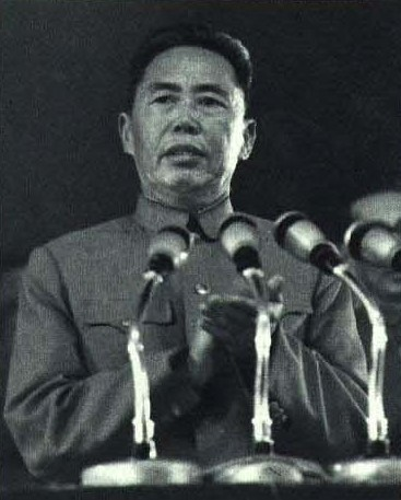 1965-11 1965年 谢富治 参加西藏自治区第一届人大第一次会议